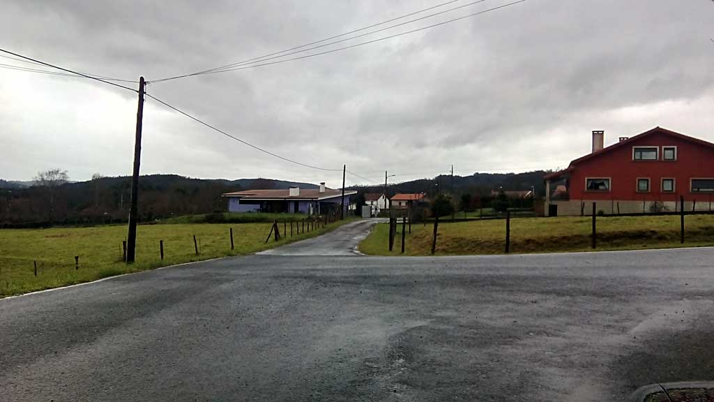 Vista do Pozo, Pedroso, Narón.